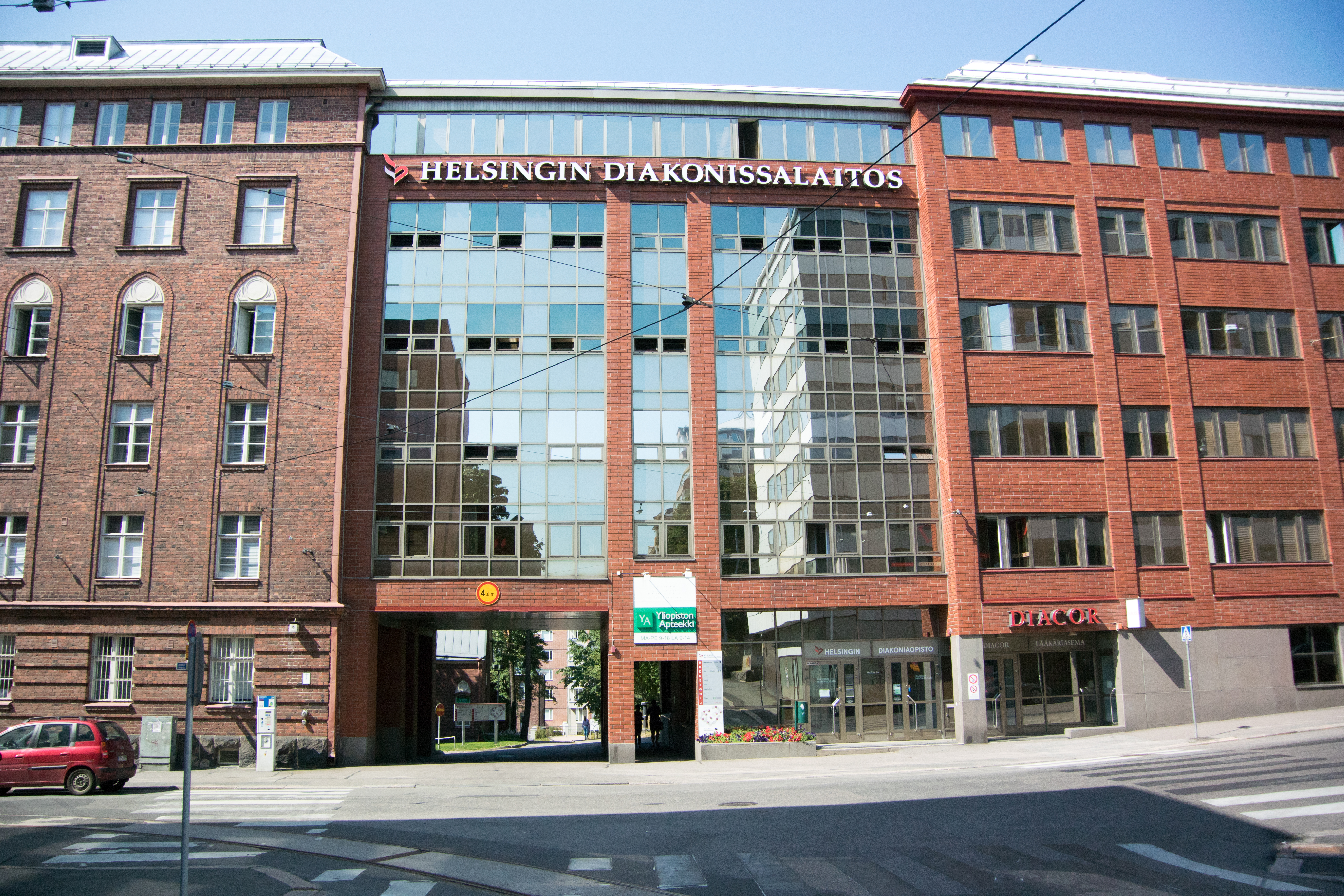 Helsingin diakonissalaitos